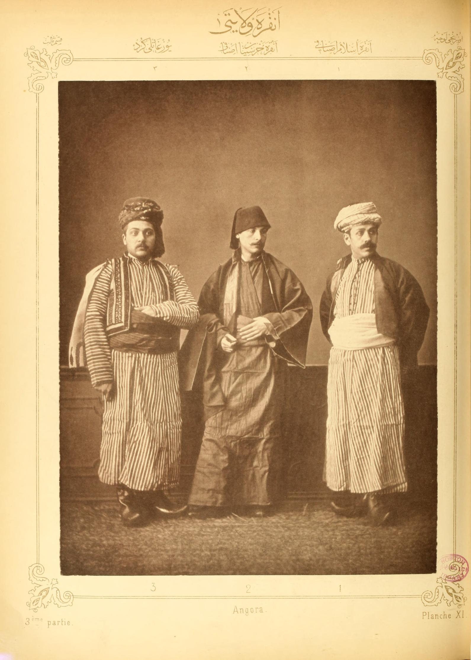 VILAYET D'ANGORA PLANCHE XI : Artisan musulman d'Angora Artisan chrétien d'Angora Kurde des environs de Yuzgat